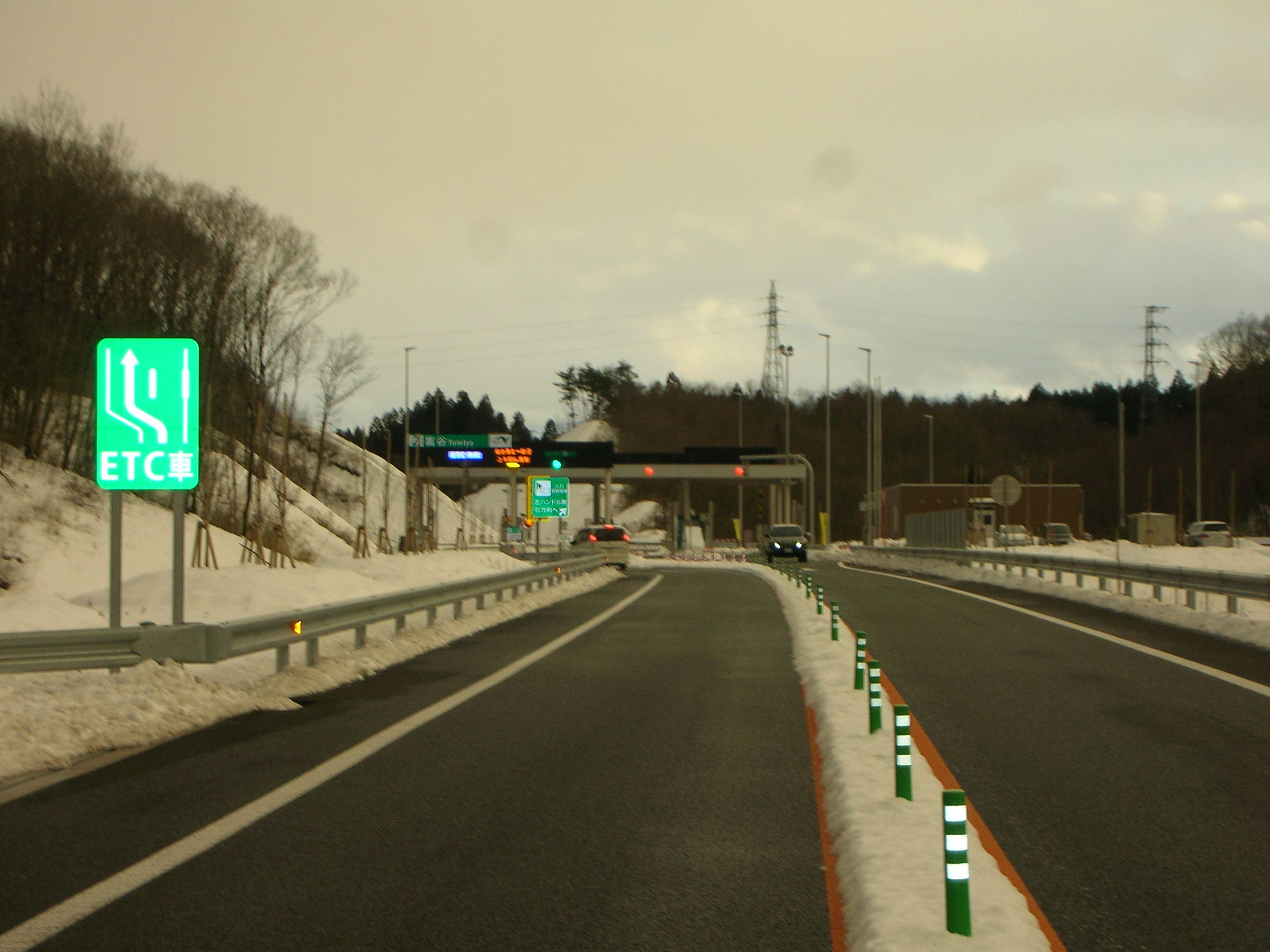 富谷インターチェンジ